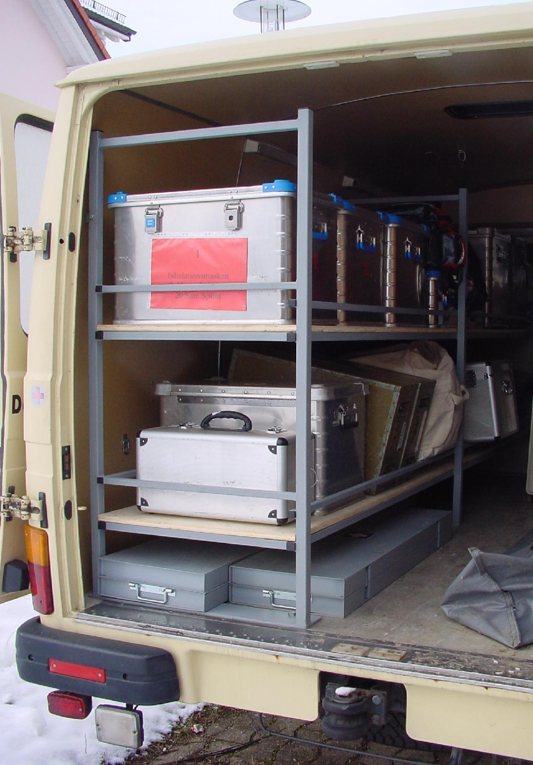 Arzttruppkraftwagen